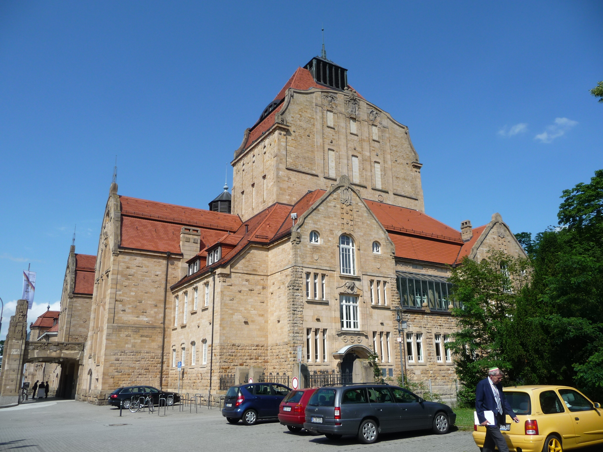 Die Jugendstil-Festhalle (Ludowici-Festhalle) ist die Mehrzweckhalle der Stadt Landau in der Pfalz und zählt zu den bedeutendsten Jugendstilbauten Süddeutschlands.